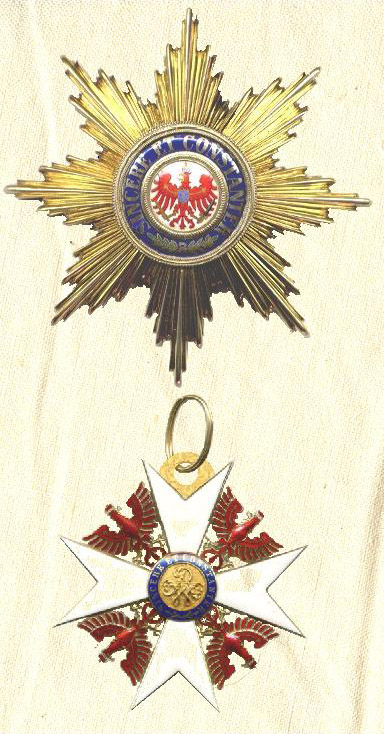 Eigen scan van een ster in mijn collectie. Kruis uit 1852 Bewerkt met paint Geen copyright